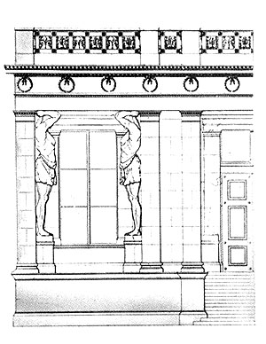 Проект портика южного фасада Нового Эрмитажа (1843 год, Лео фон Кленце)